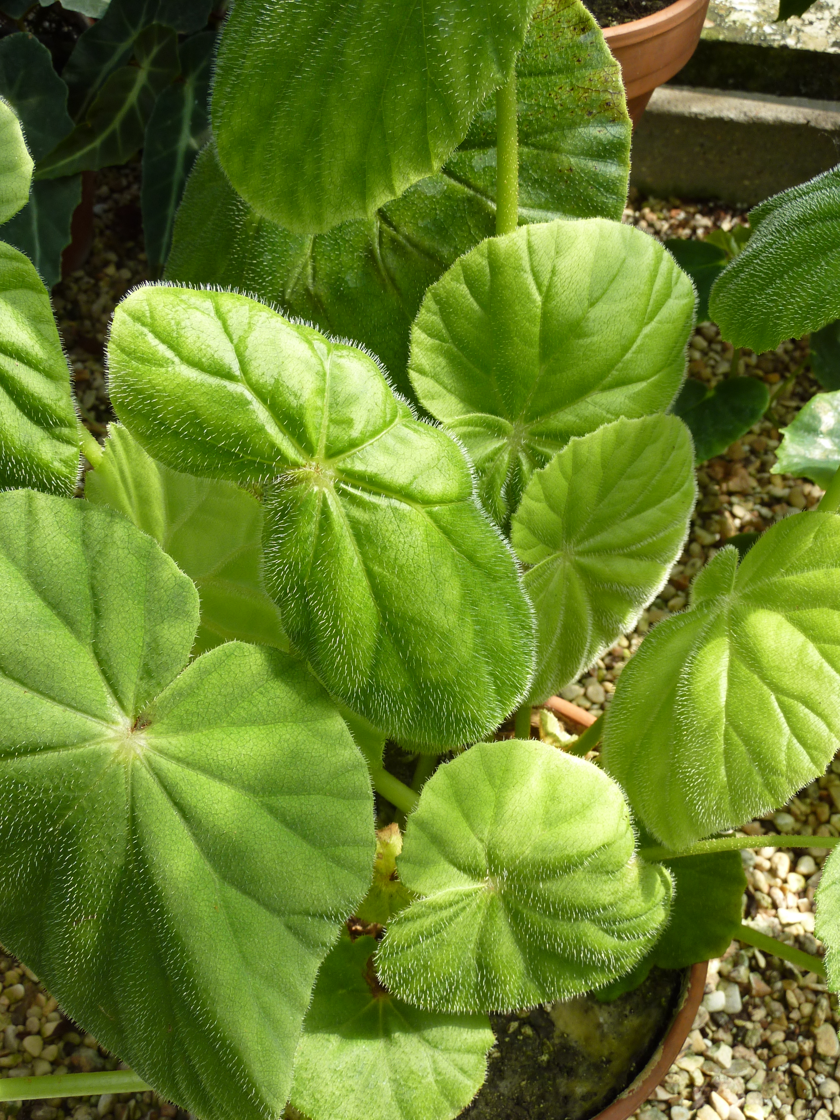 "Begonia karwinskyana", serres chaudes d'Auteuil - Jardin botanique de la Ville de Paris - France